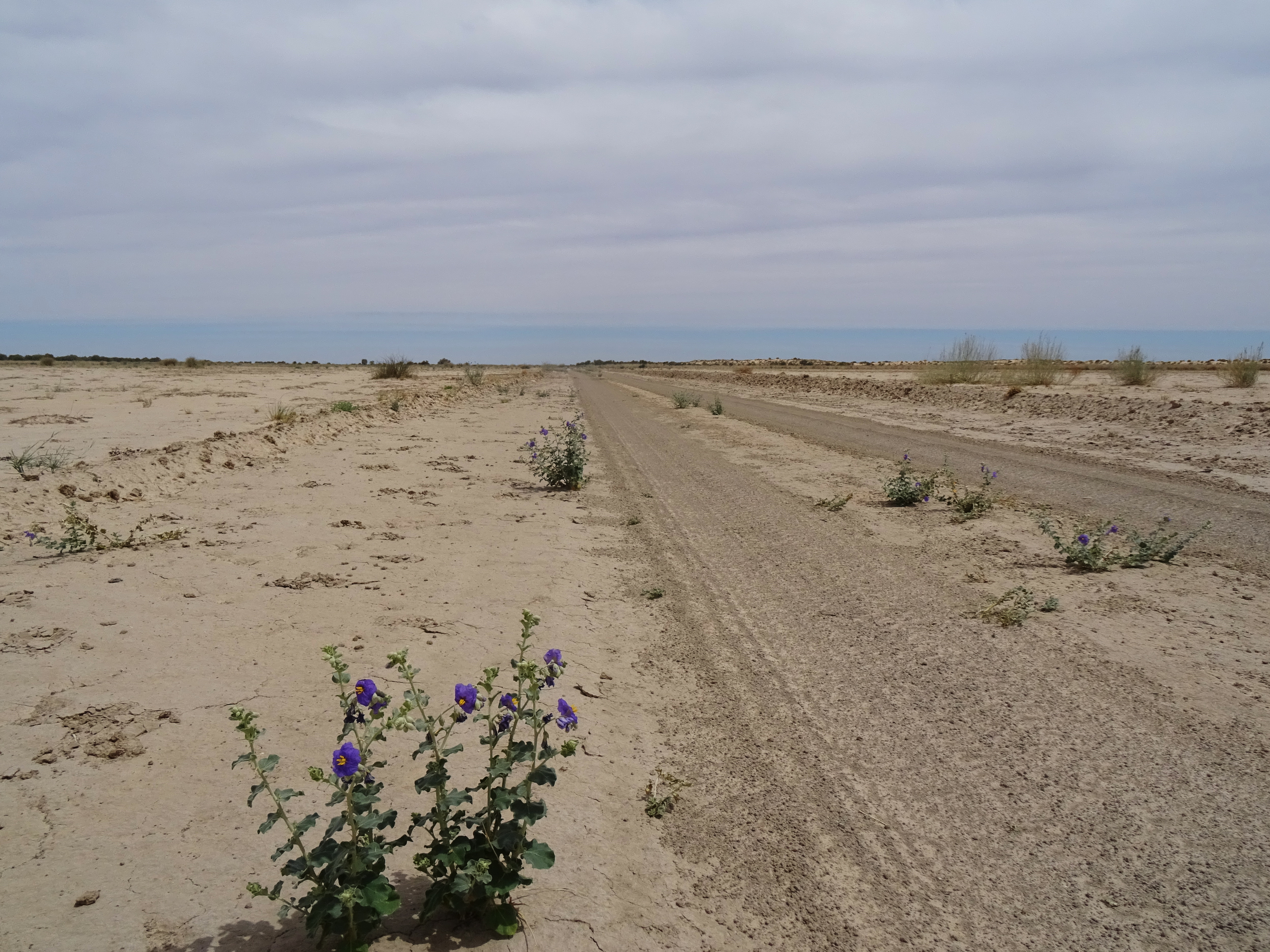 Birdsville DSC02999 SA